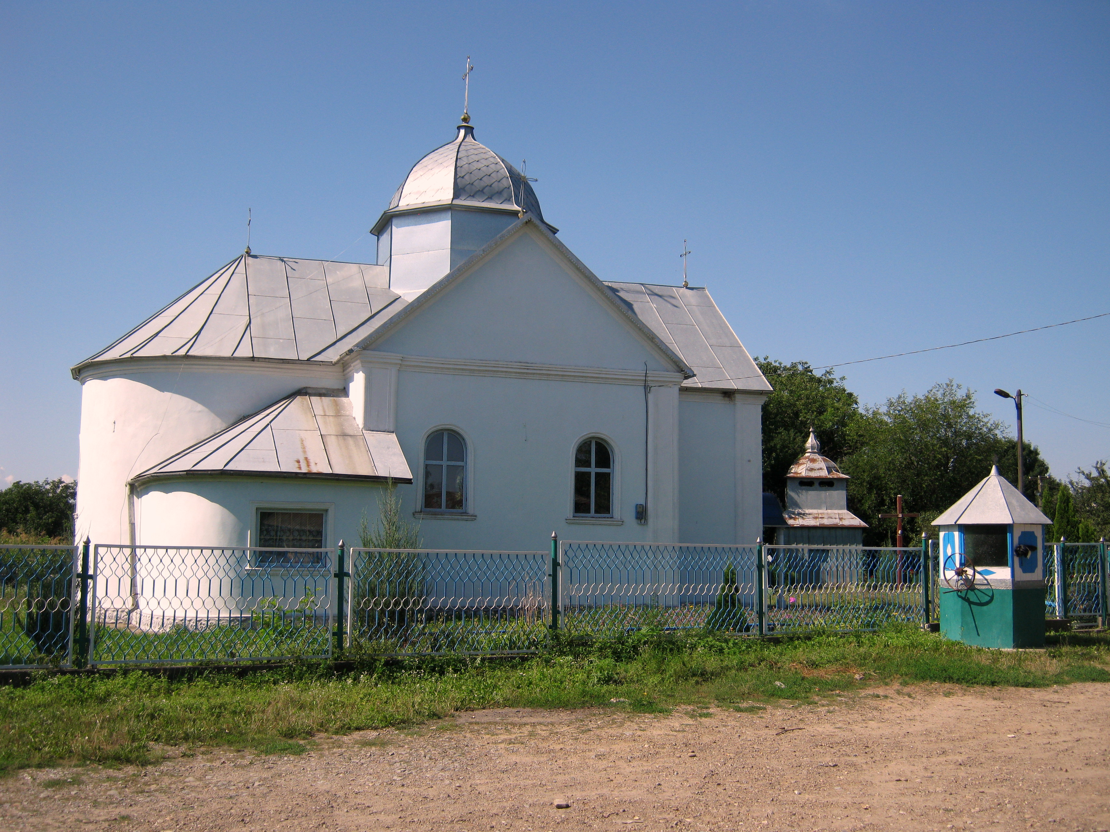 Церква Вознесіння Господа Нашого Ісуса Христа в селі Зелене Борщівського району Тернопільської області.